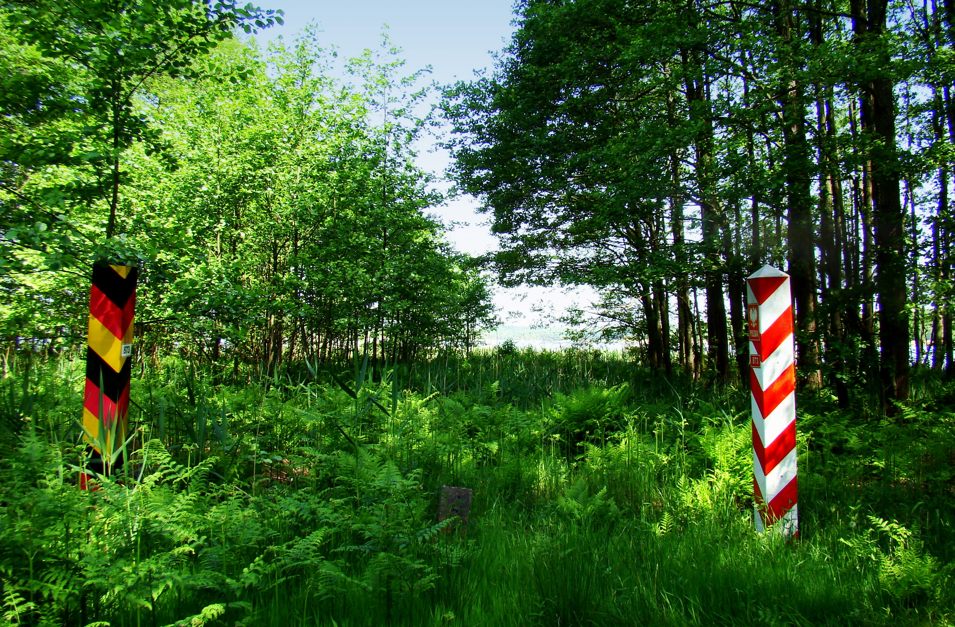 Granica państwowa polsko-niemiecka, znak graniczny nr. 873, w tle Jezioro Myśliborskie Wielkie